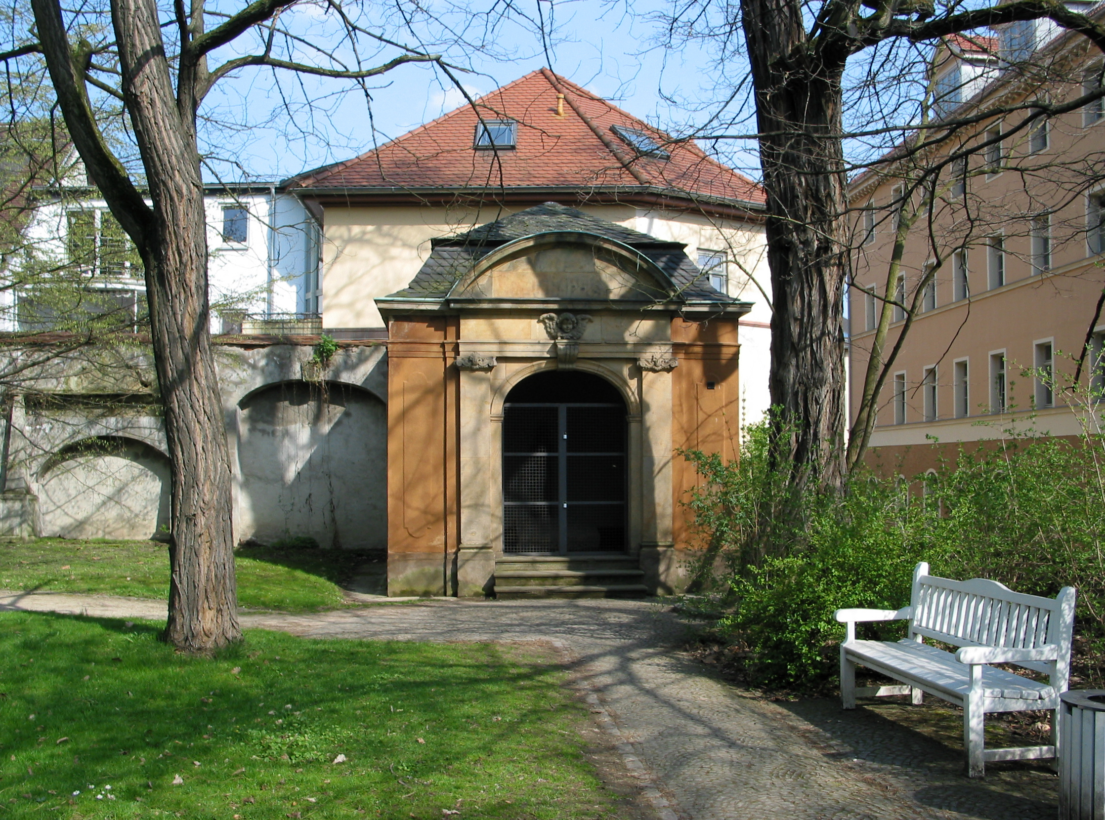 Blick zum Kassengewölbe (Schillergruft) in der südöstlichen Grundstücksecke des Jakobskirchhofs in Weimar.